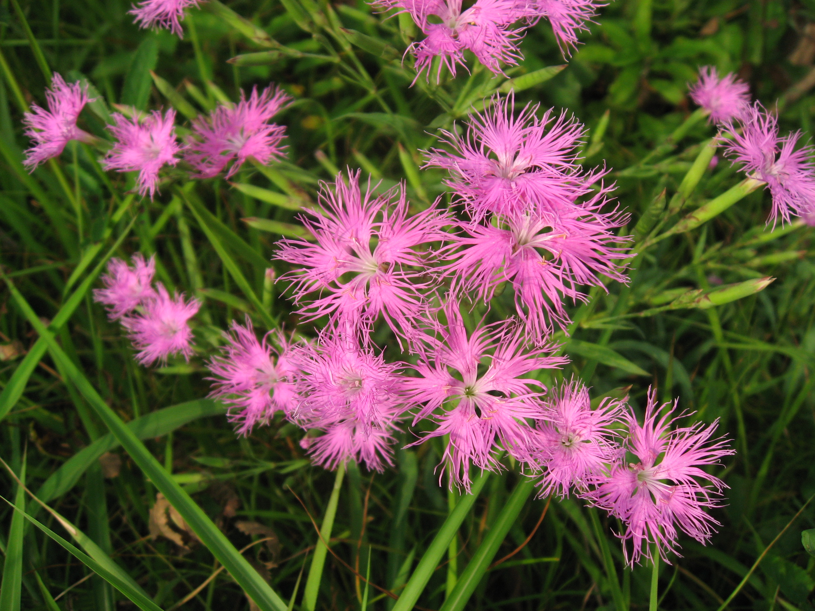 カワラナデシコ Dianthus superbus var. longicalycinus